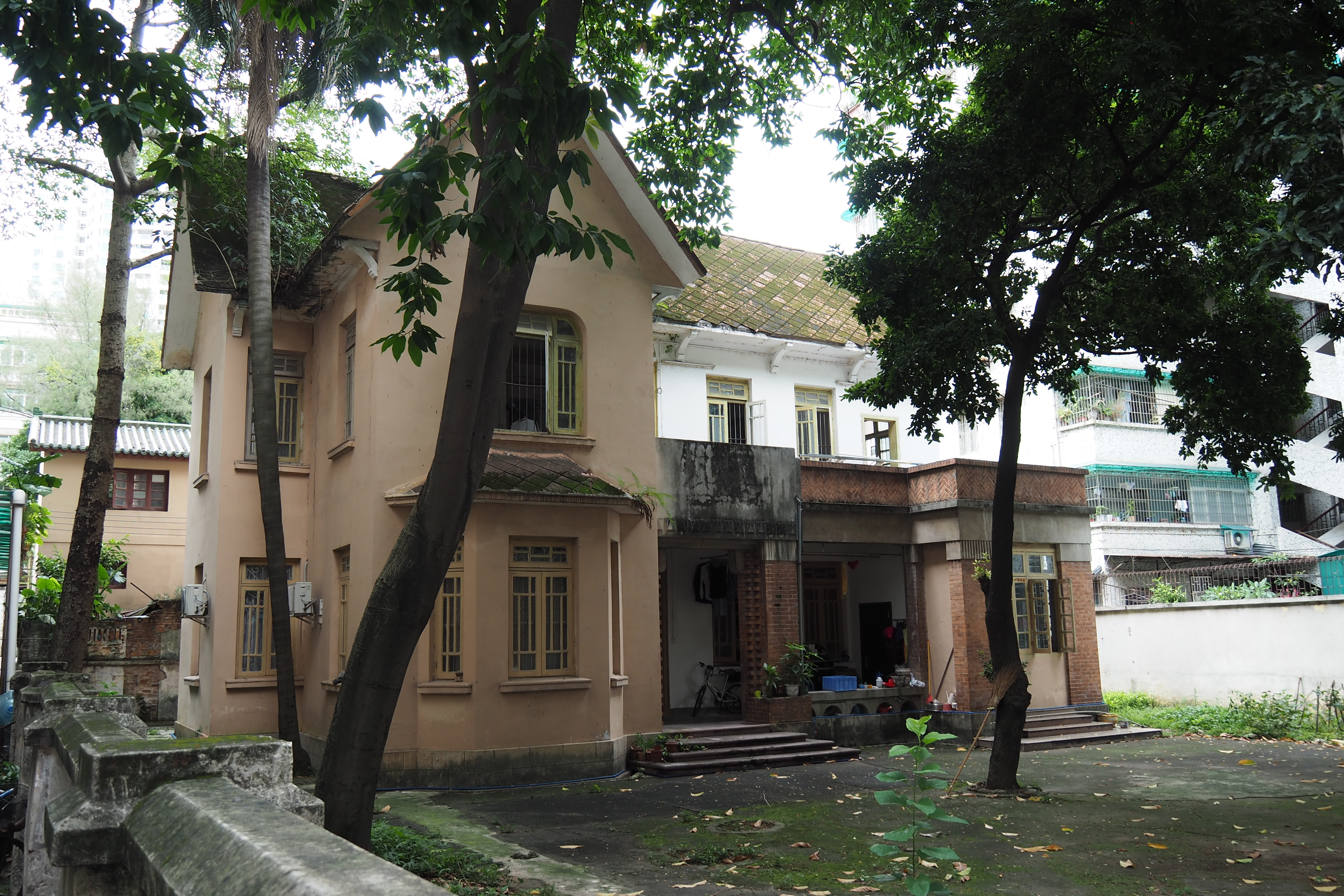 中文（中国大陆）: 位于广东省广州市越秀区中山一路梅花村29号。